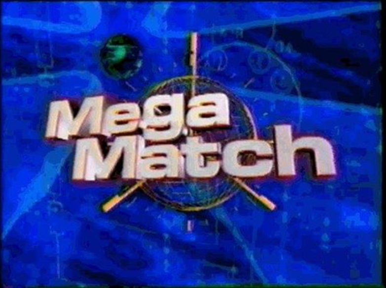 Logo 2002-2007